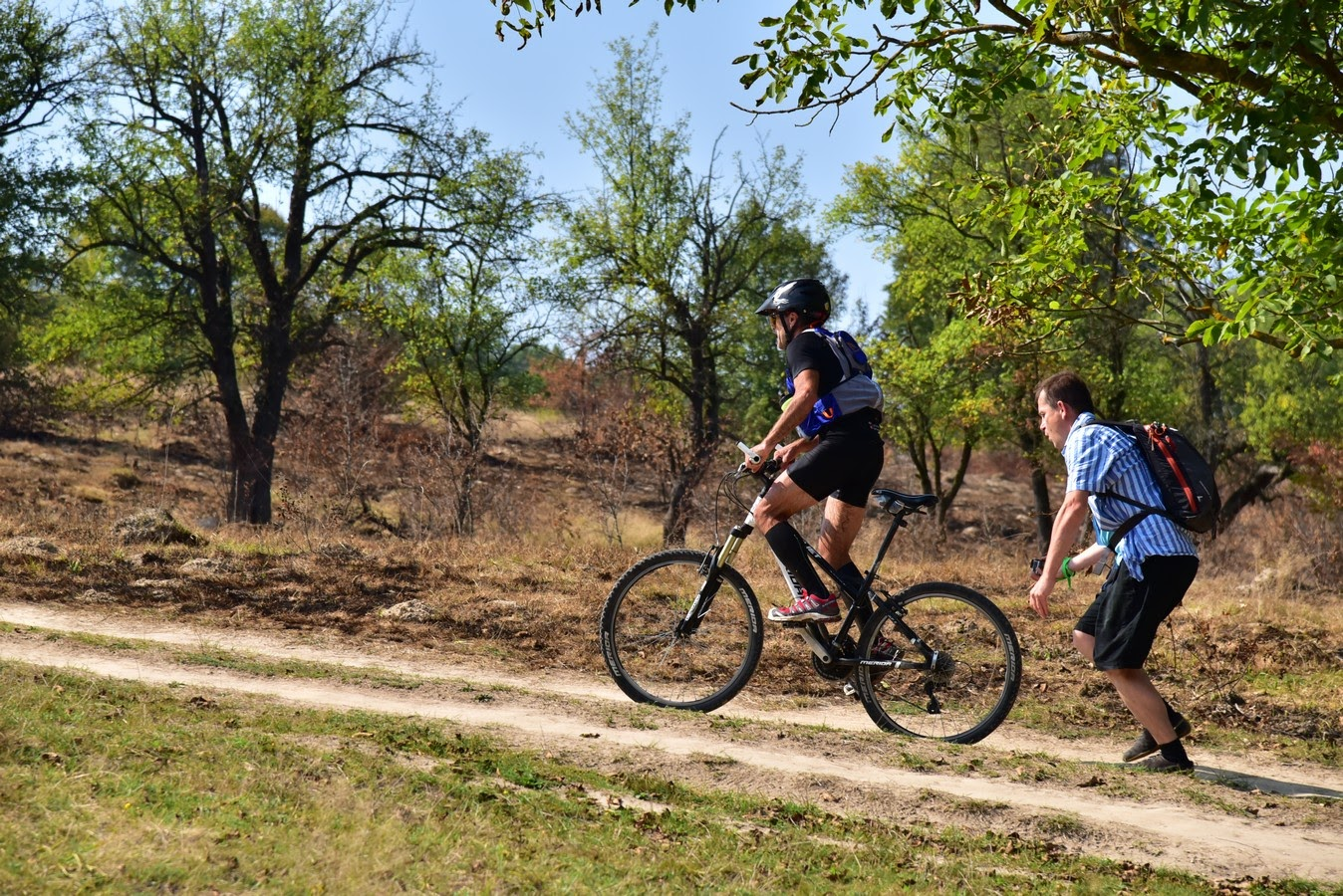 Сергій Сапіга під час велоперегонів